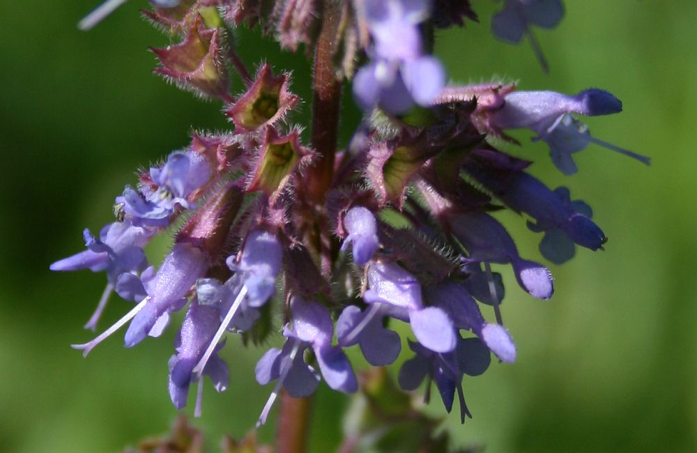 Quirl-Salbei (Salvia verticillata), Lippenblütler (Lamiaceae) - Österreich/Austria/Autriche: Niederösterreich, Alpenostrand, Südostfuß des Pfaffstättner Kogels NW Pfaffstätten, ca. 350 m s.m.